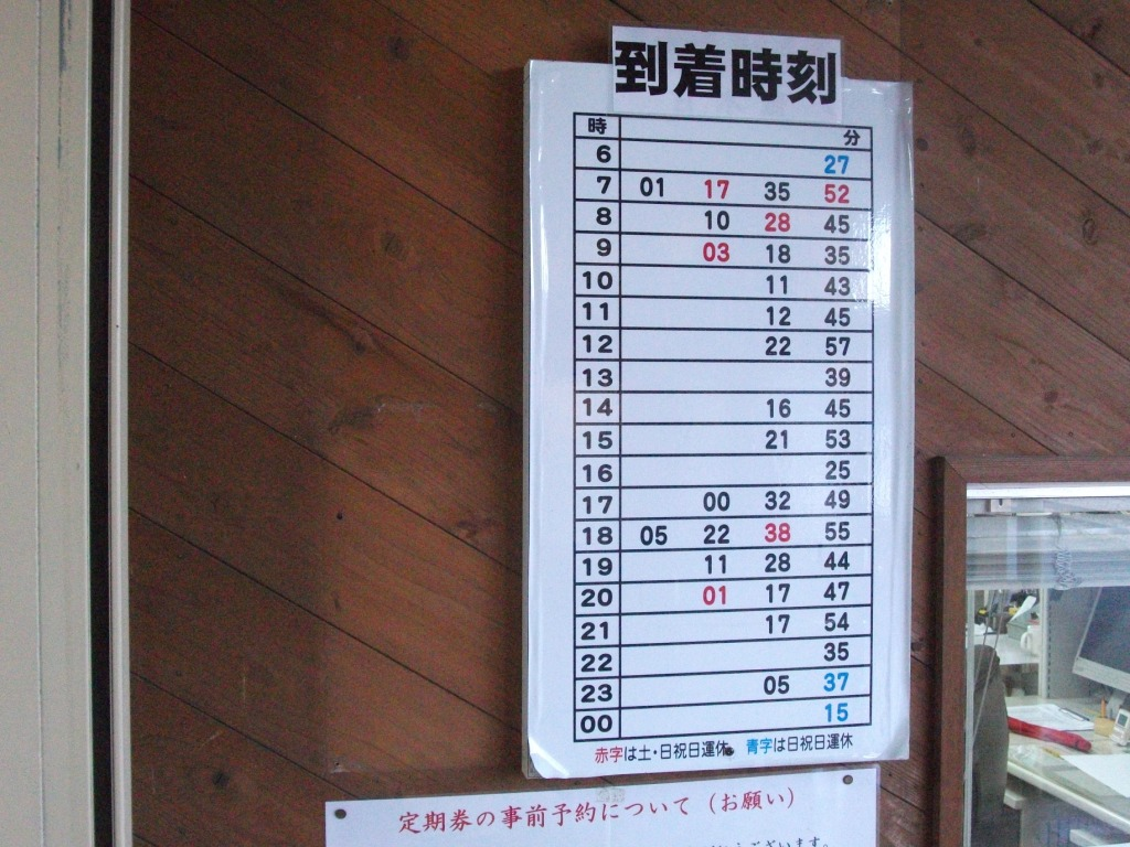 甘木駅到着時刻表